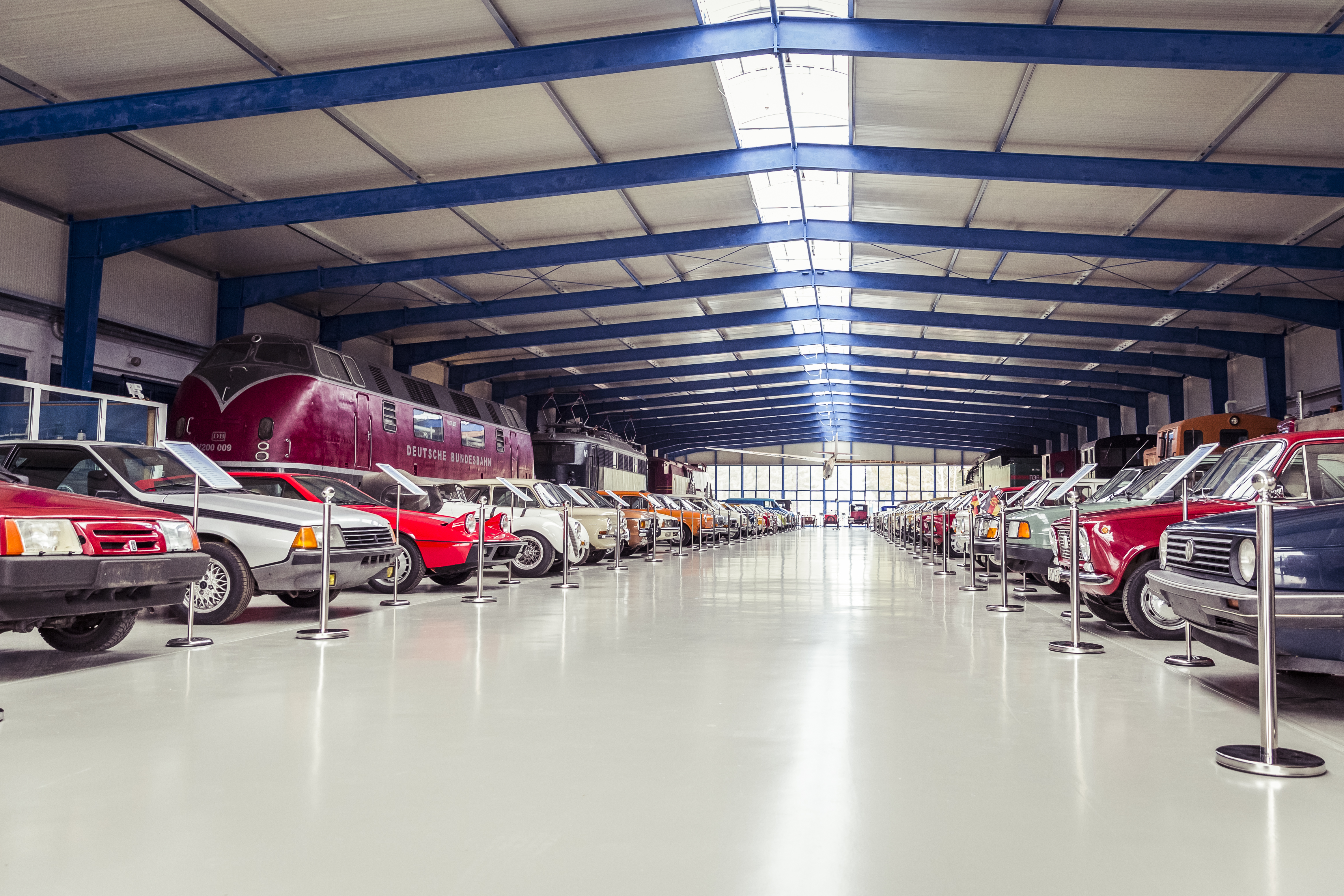 Seit April 2019 präsentiert das Oldtimer Museum Rügen die Ausstellung über die "40 Jahre geteilte Automobilgeschichte Deutschlands" im Ost-West-Vergleich.